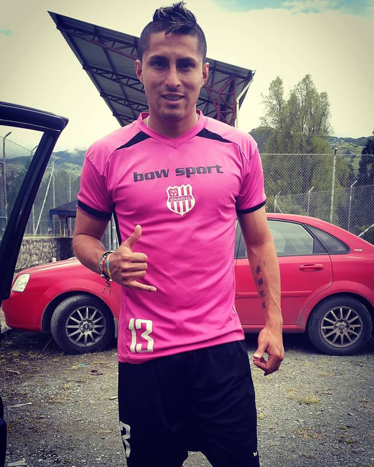 Ivan Trelles en el Gualaceo SC en el 2016